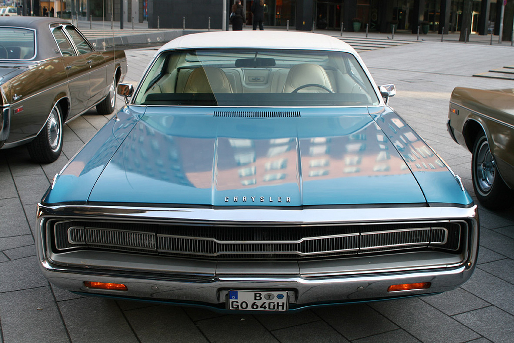 1971 Chrysler 300